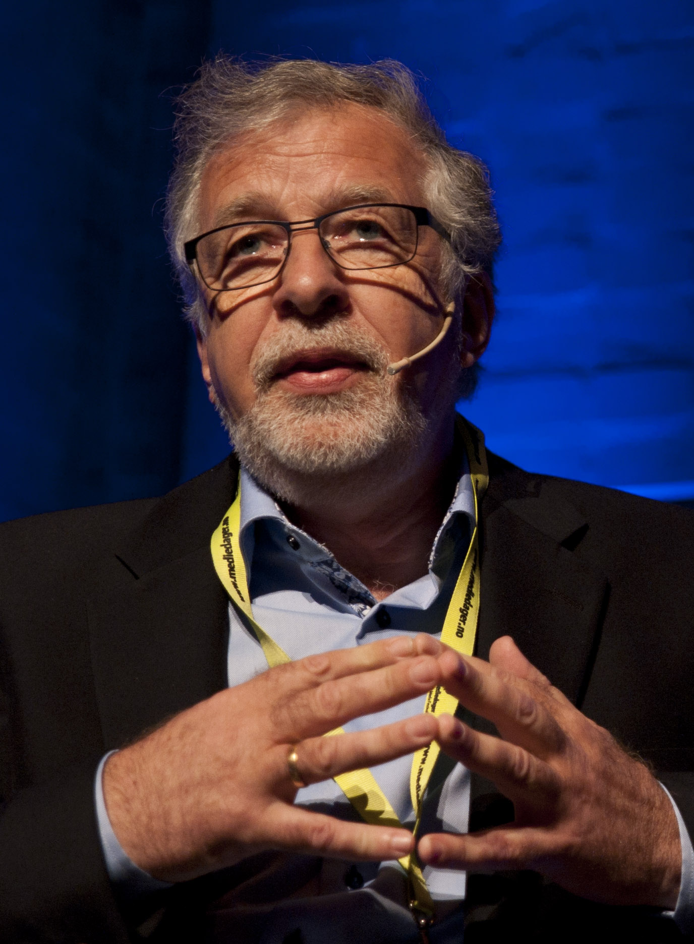 Oddgeir Bruaset, Nordiske Mediedager 2011, foto: Trude S. Pedersen